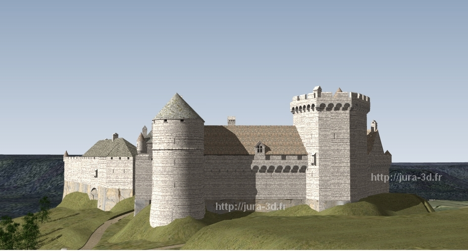 Château du mont Rivel. Etat restitutué au XVe siècle. Vue du nord.